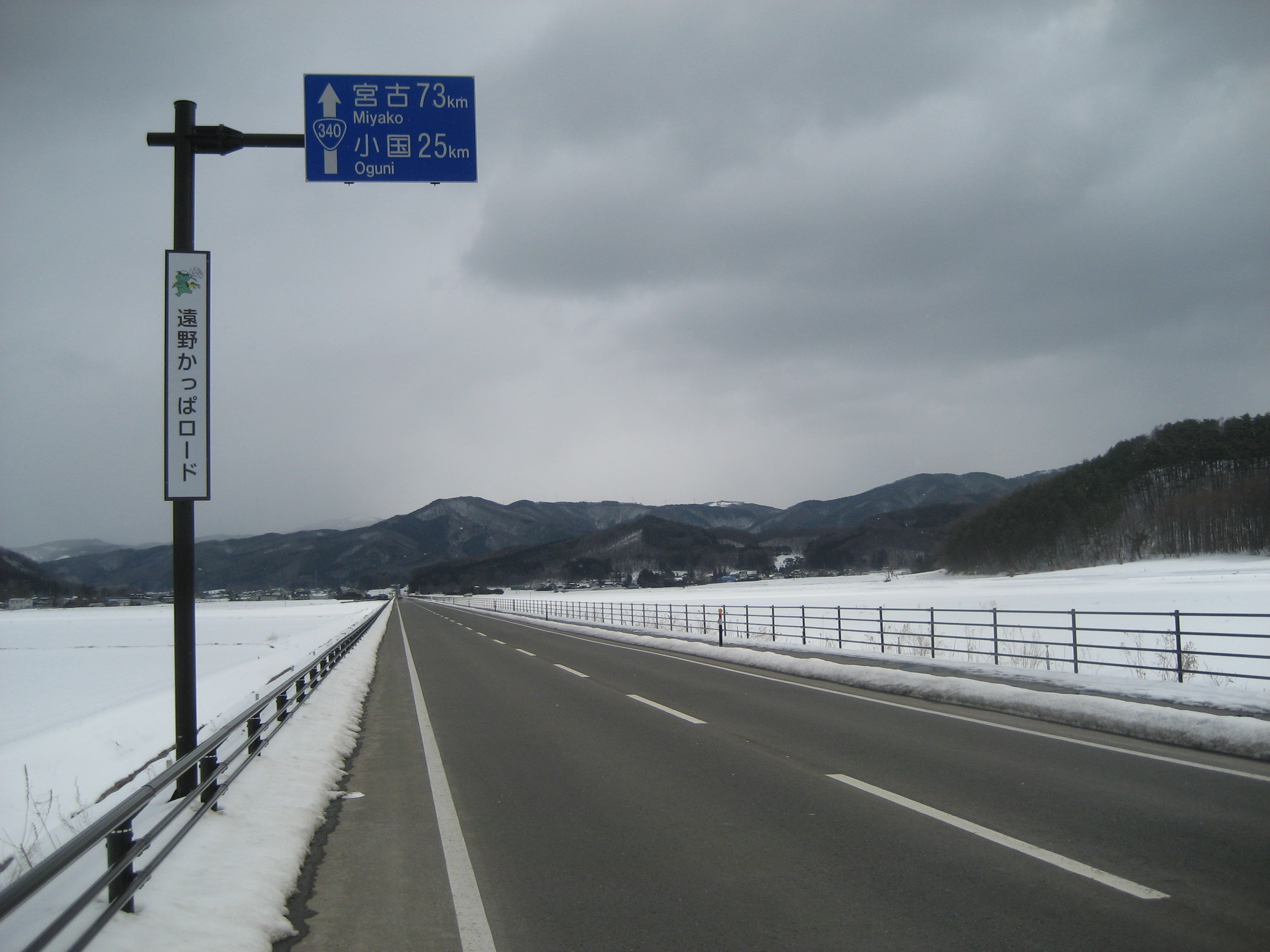 国道340号線土淵バイパス岩手県遠野市土淵付近